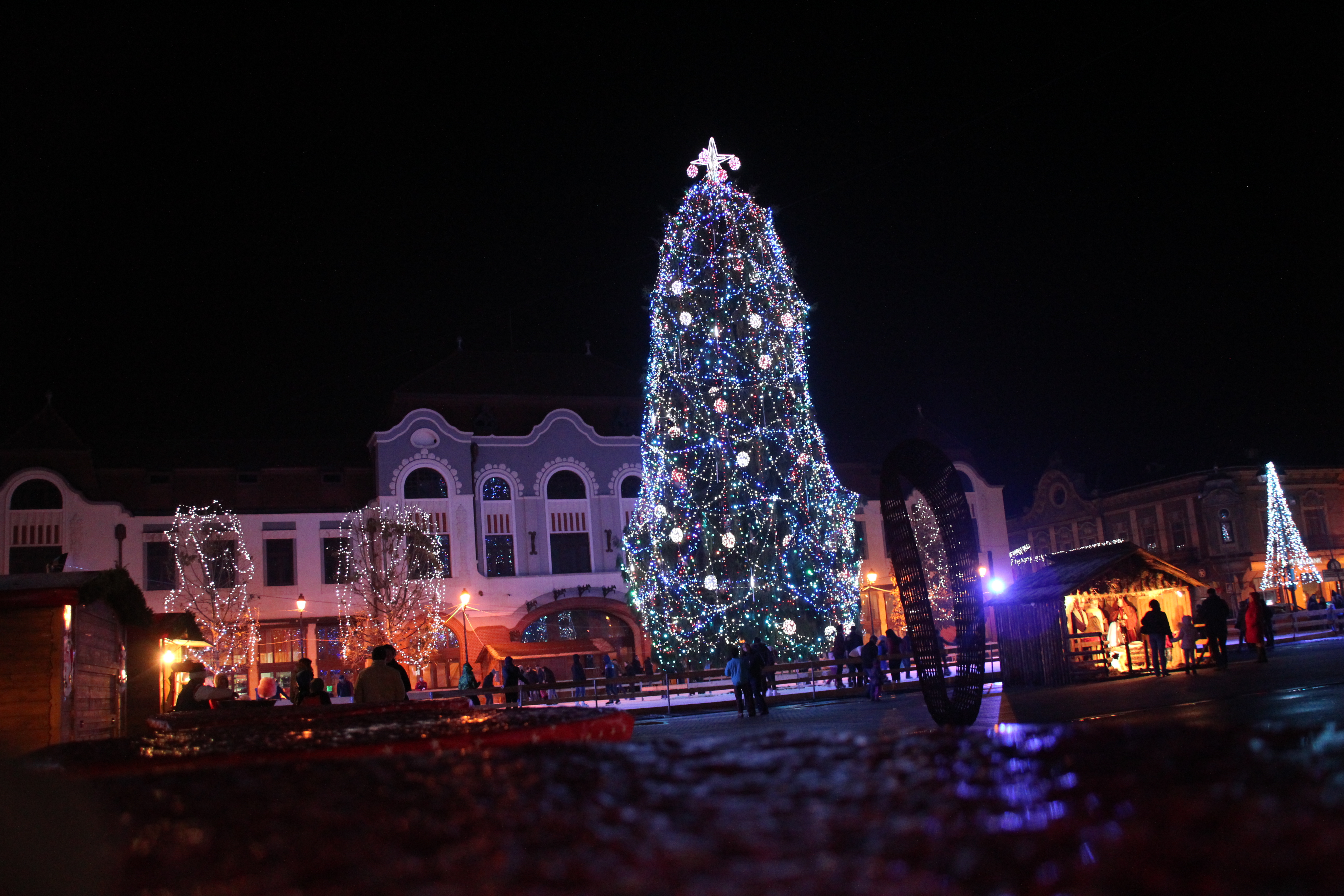 Torvet i Baia Mare